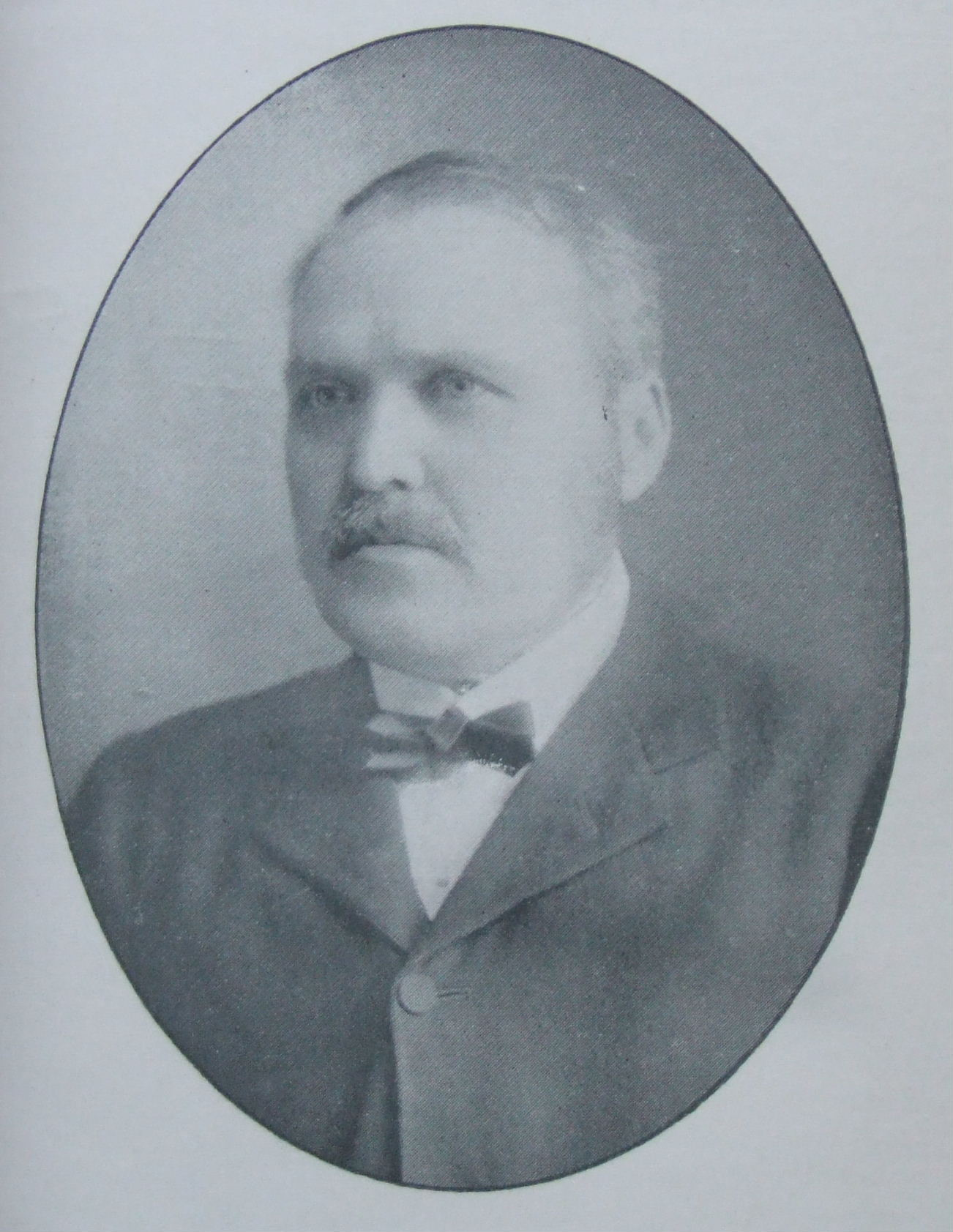 Emrys ap Iwan, llun o'r ail argraffiad o'r gyfrol "Homliau", Dinbych 1907 (llun gan Anatiomaros)